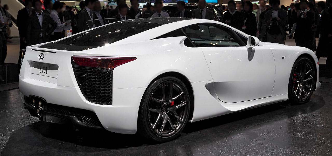 Lxus LFA.